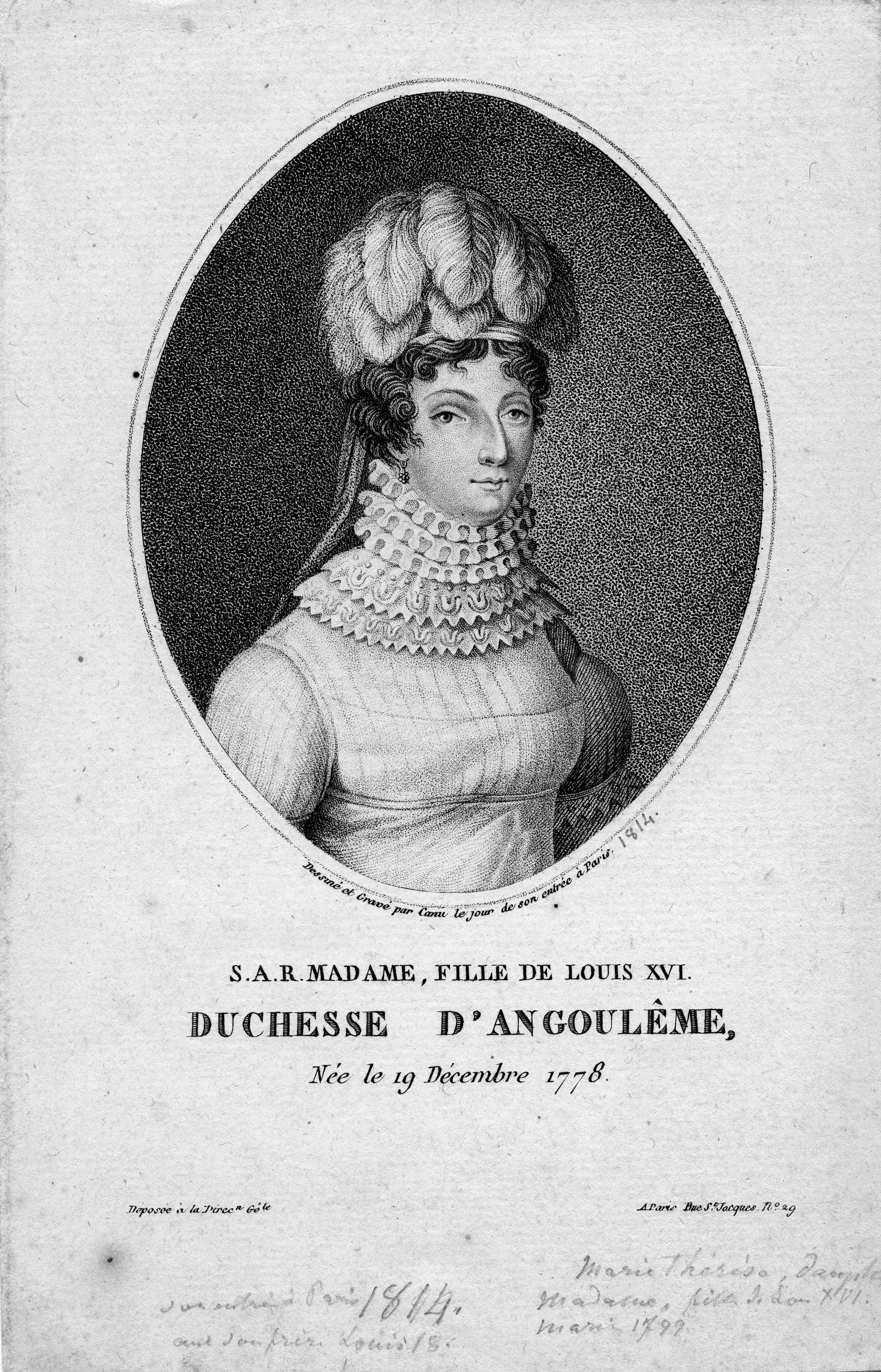 portrait gravé